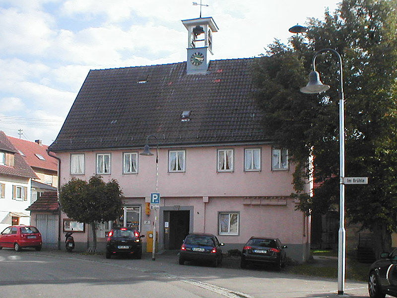 Altes Rathaus in Aspach-Großaspach, Baden-Württemberg, Deutschland